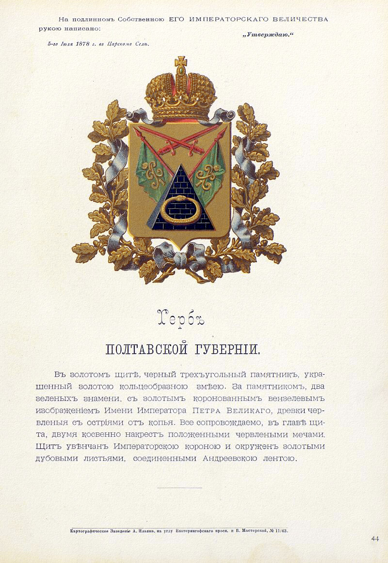 Official Russian Empire coat of arms Poltava Governorate. Герб Российской Империи Полтавской губернии с официальным описанием в Гербовнике Бенке. Утверждён Императором Всероссийским Александром Вторым.